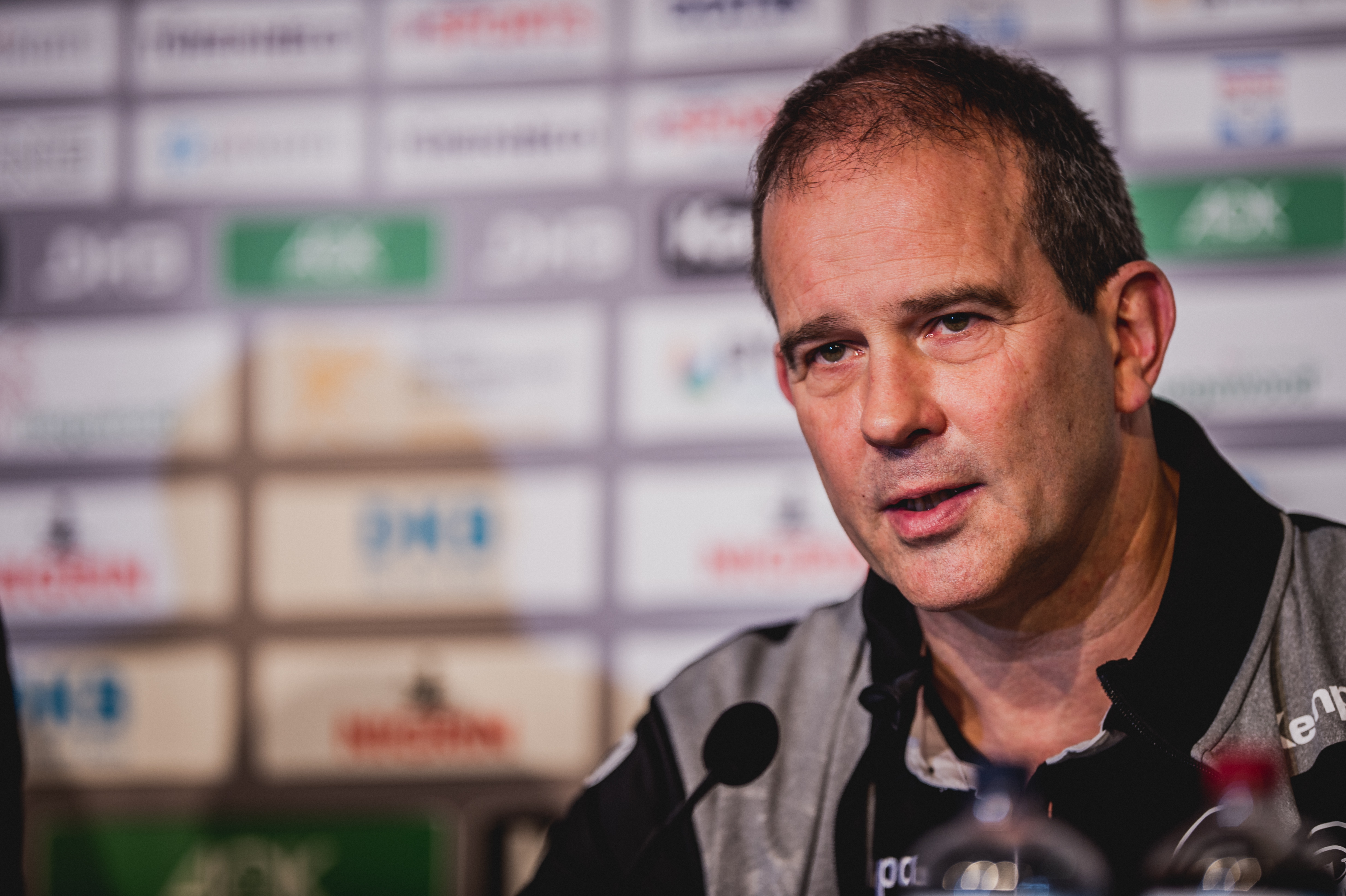 Pressetermin der Deutschen Handballnationalmannschaft am 4. Januar 2018 in der Porsche-Arena in Stuttgart